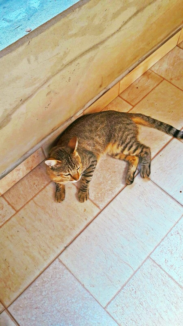 Filhote com pelo malhado